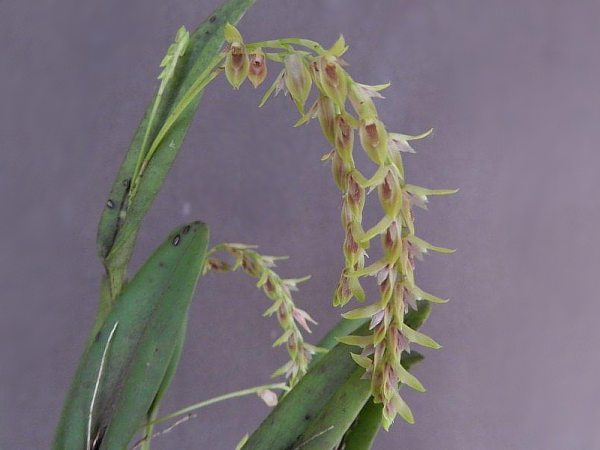 Photos by Dalton Holland Baptista & Donato Seidel Jr.. A specimen from Paraná State - Brazil